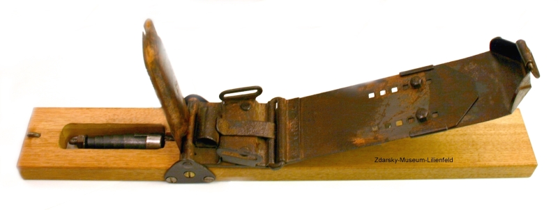 Lilienfelder-Stahlsohlenbildung